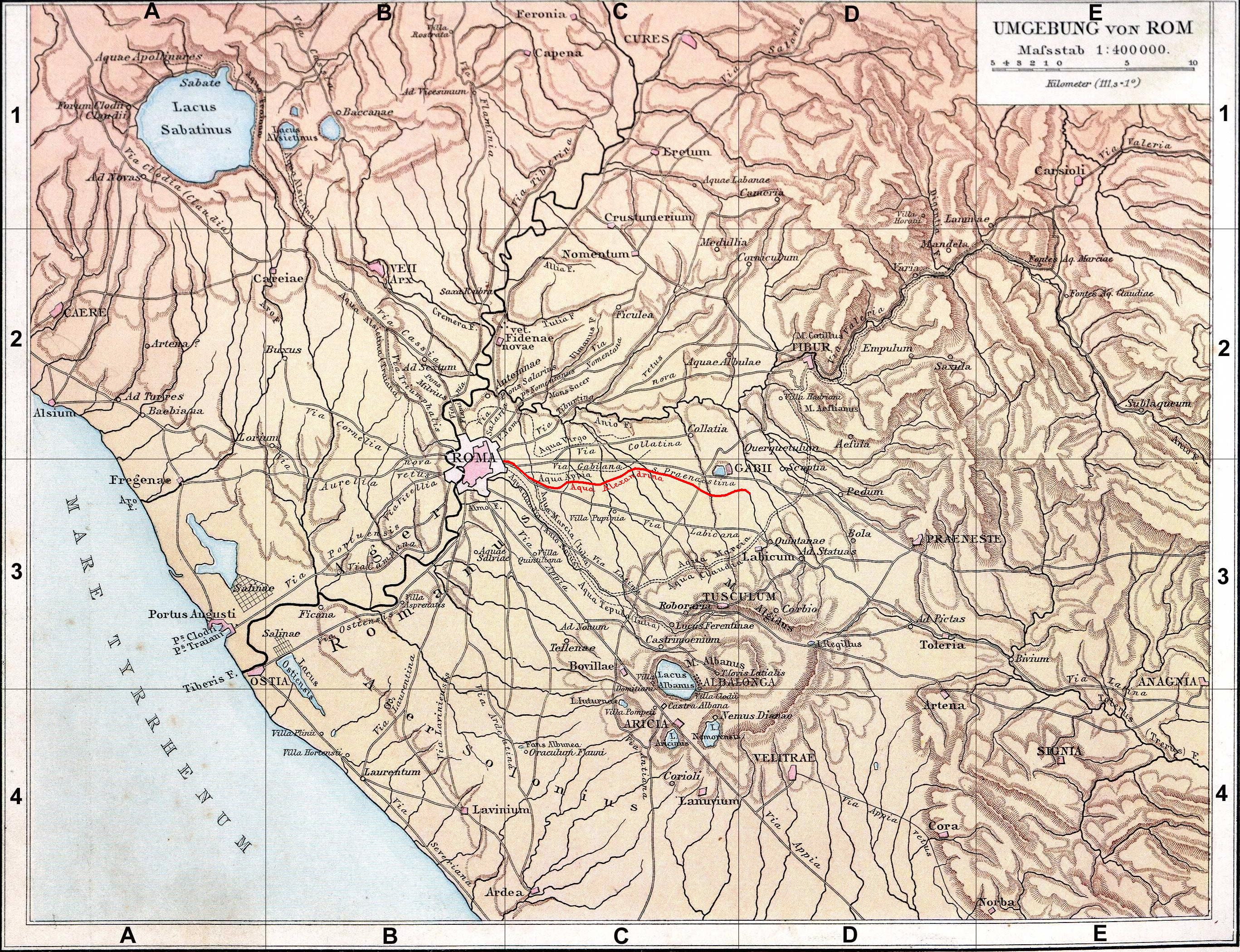 Fond de carte de 1886 (G. Droysens Allgemeiner Historischer Handatlas), libre de droit (Image:Rom_Umgebung.jpg), avec l'aqua Alexandrina en rouge.